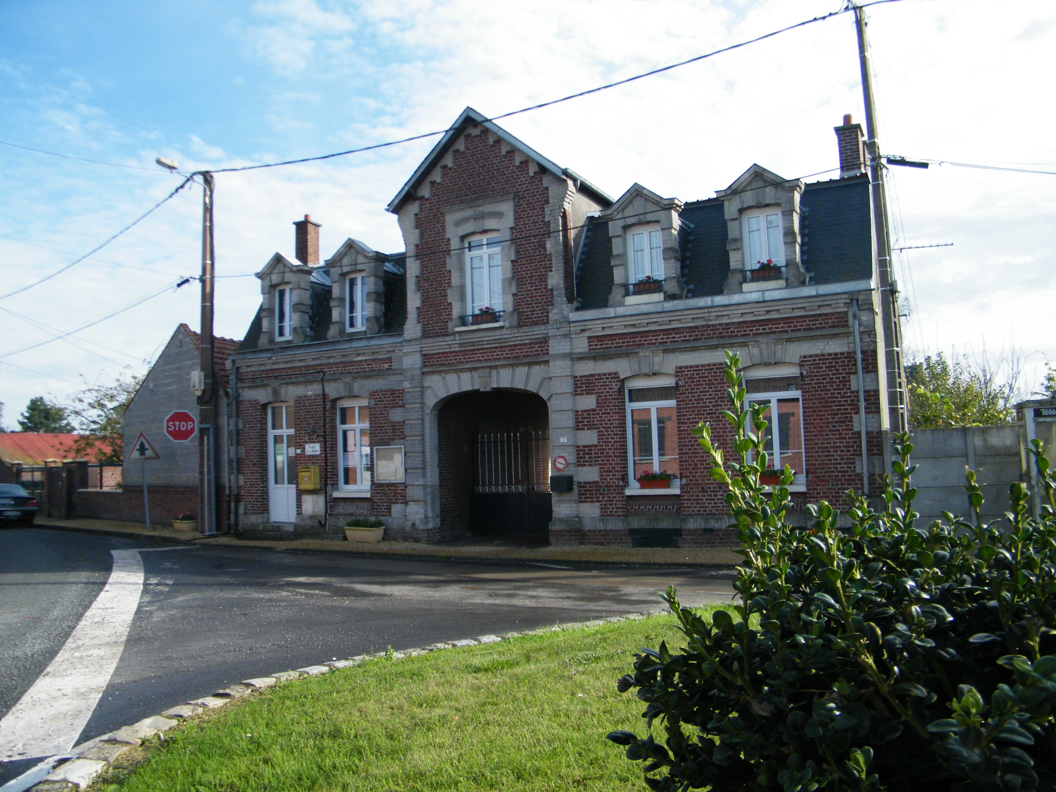 Entrée de propriété.